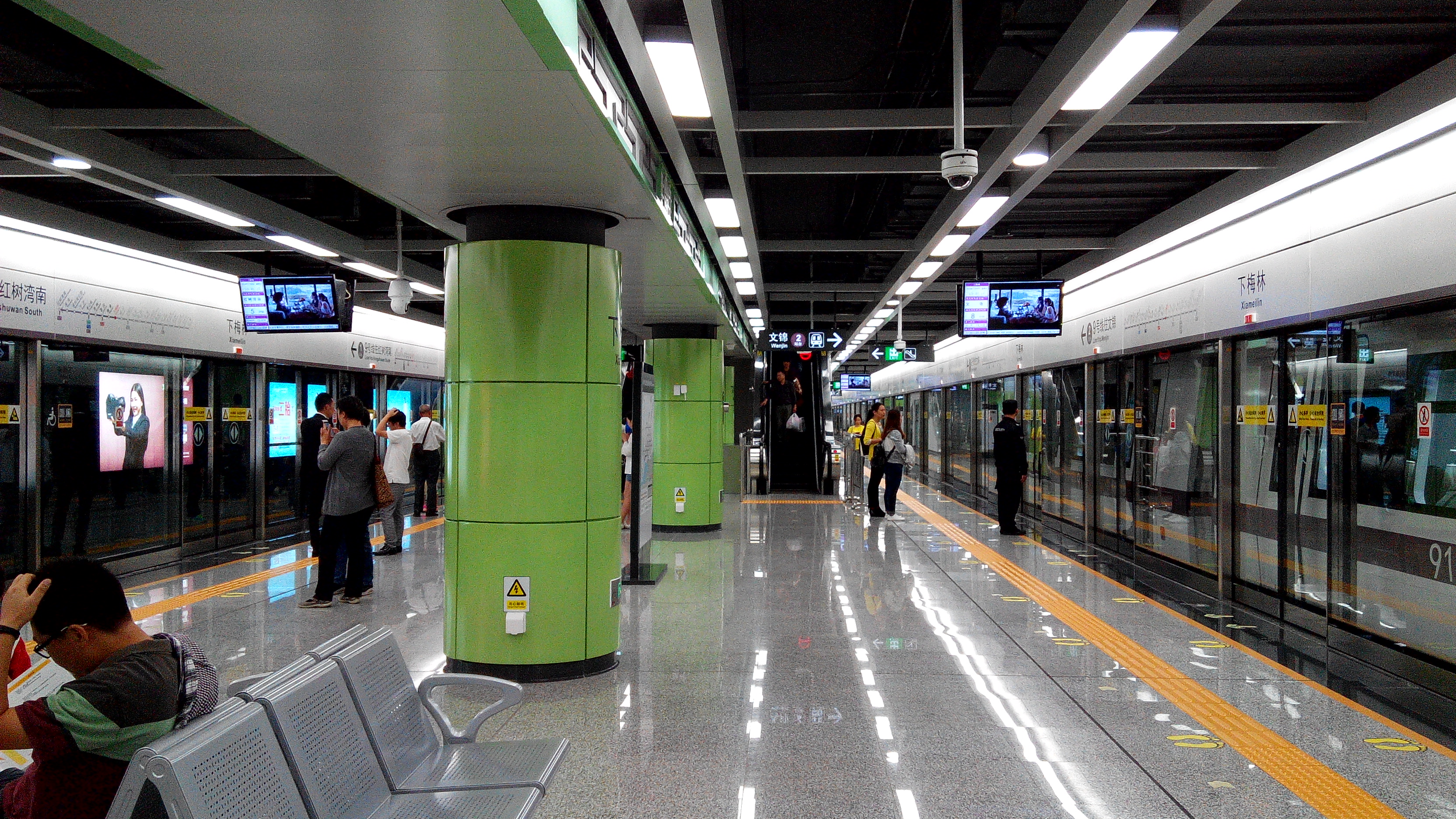 深圳地铁9号线 下梅林站站台